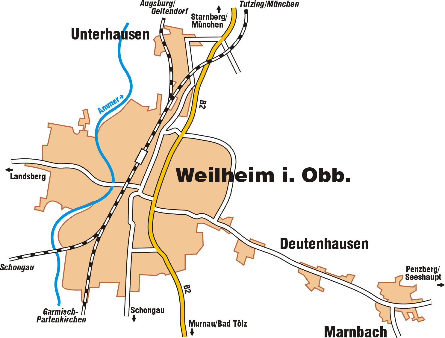 Ein Übersichtsplan von Weilheim in Oberbayern